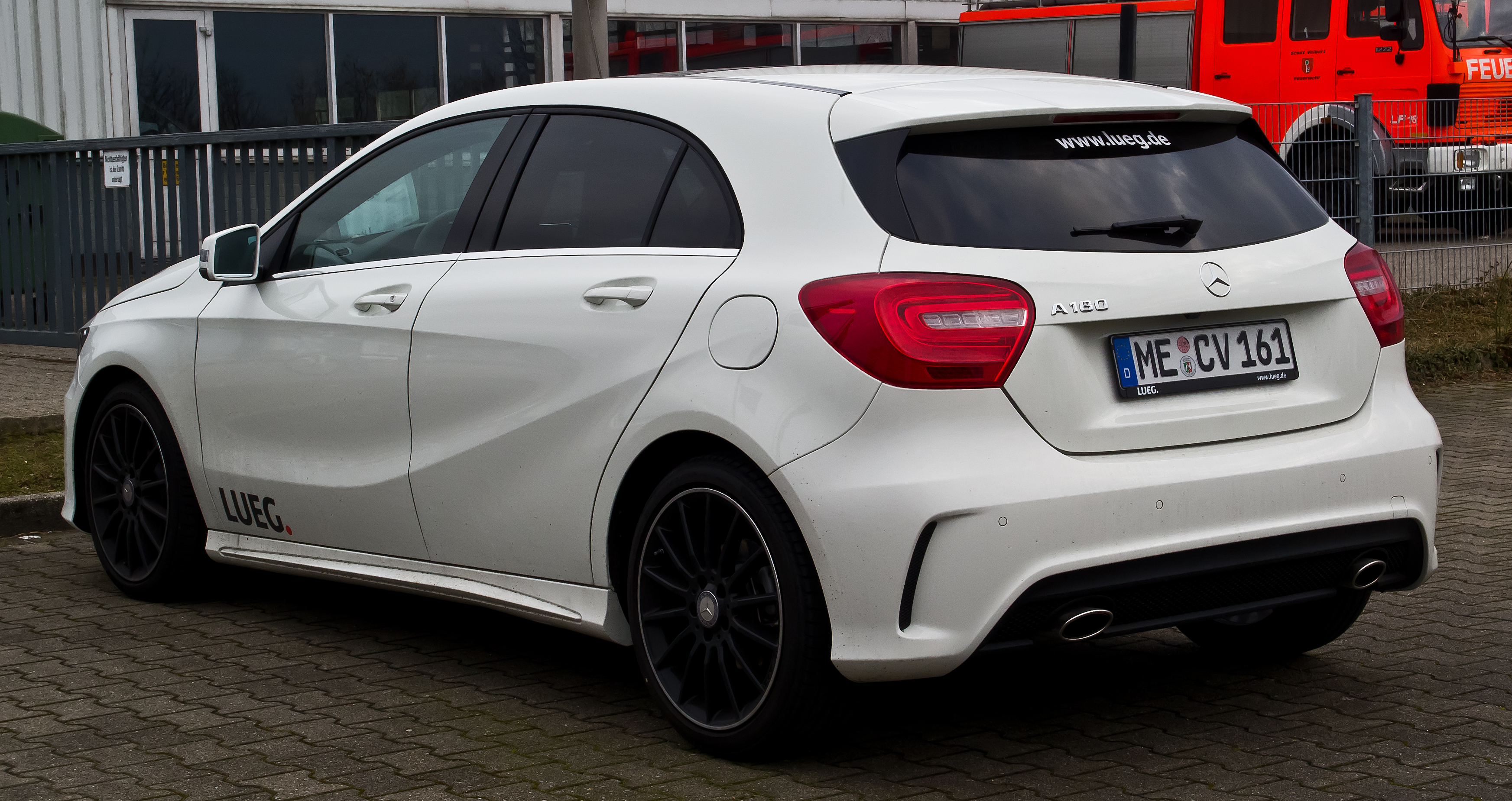 Mercedes-Benz A 180 AMG Line (W 176)